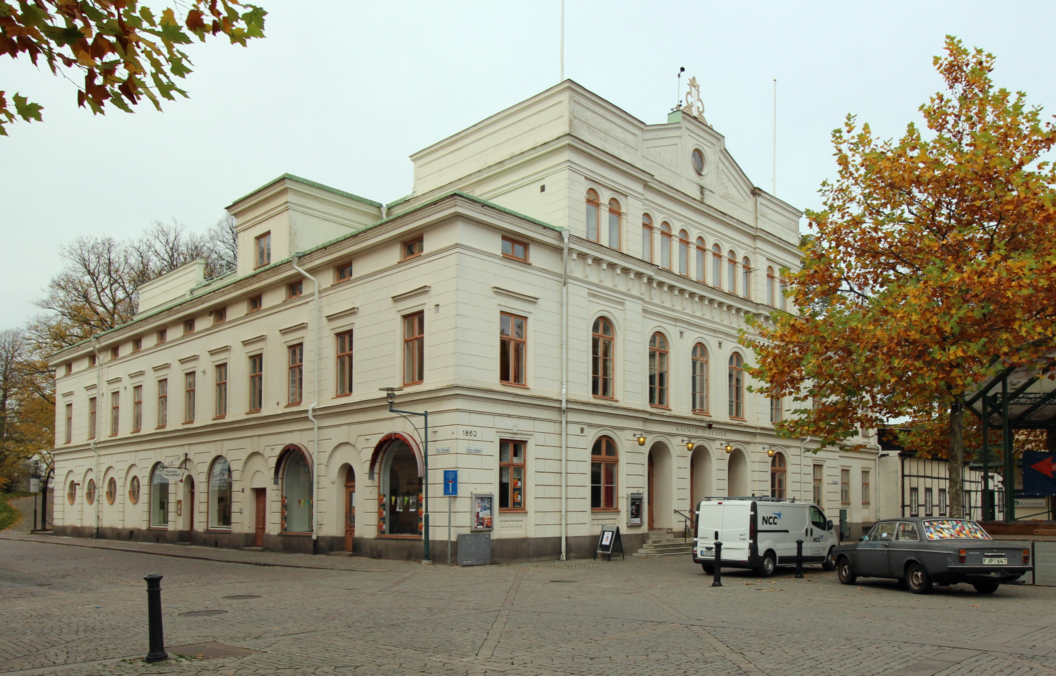 Kalmar teater, färdigbyggd 1863, ritades av arkitekten och byggmästaren B C Malmberg. Teaterbyggnaden innehöll teaterkällare samt schweizeri. Teatern ombyggd flera gånger, senast 1959-60. Kalmar stad förvärvade teaterhuset 1920.